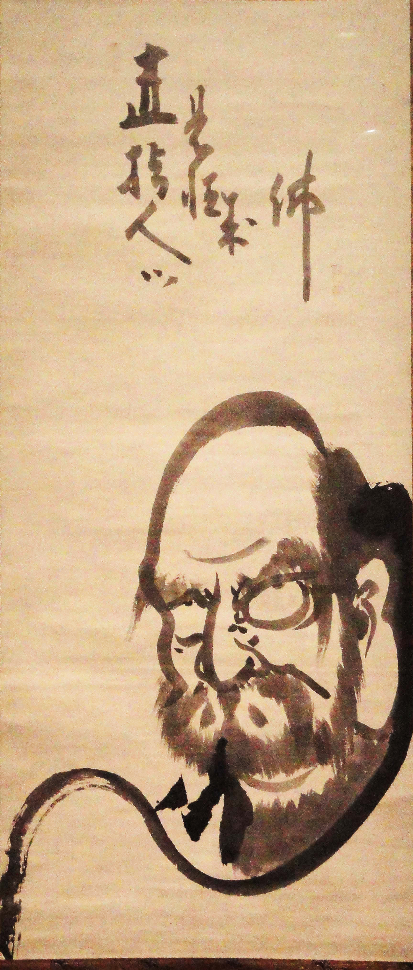 Daruma by Hakuin Ekaku (白隠 慧鶴, January 19, 1685 - January 18, 1768). Exhibit in the Indianapolis Museum of Art, Indianapolis, Indiana, USA.